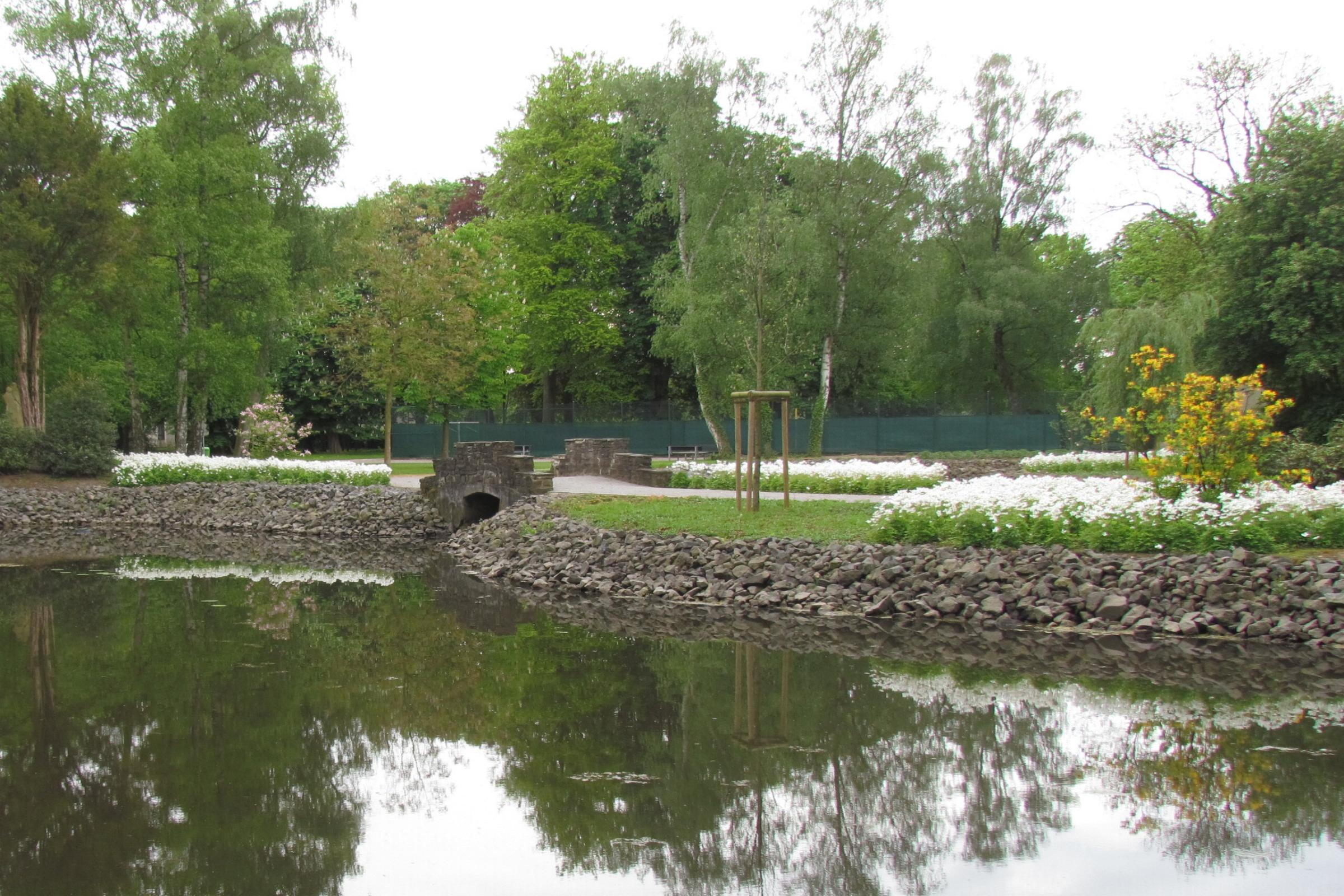 Ehemaliger Standort der Mülhausener Mühle